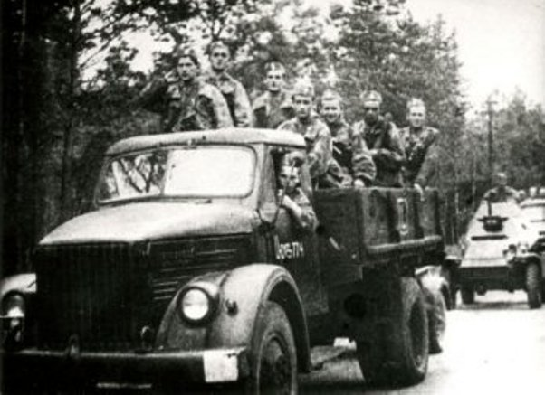 Wałcz, 1949. 19 kompania zwiadu na ćwiczeniach